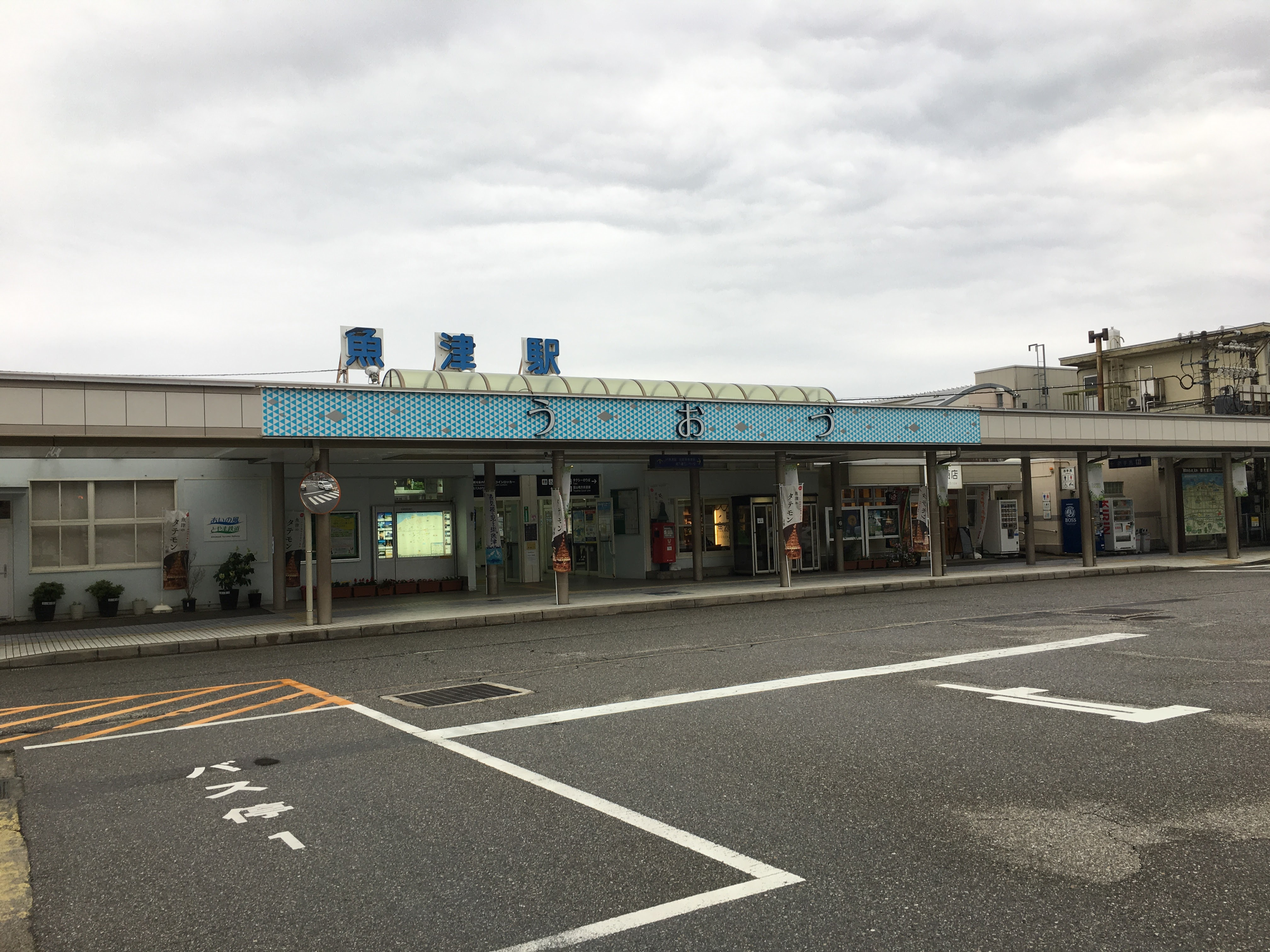 魚津駅駅舎